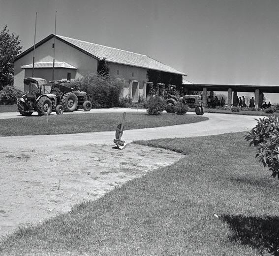 כפר מונאש - מדרשה ע"ש רופין